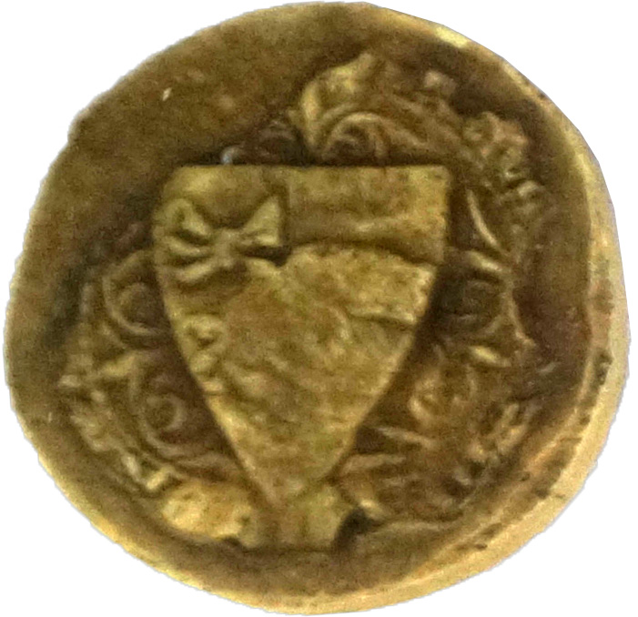 Présenté au Musée archéologique de Pons.